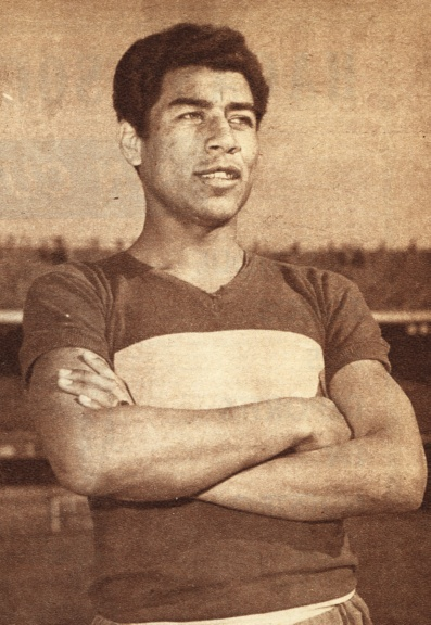 Victor Benitez Morales at Boca Juniors